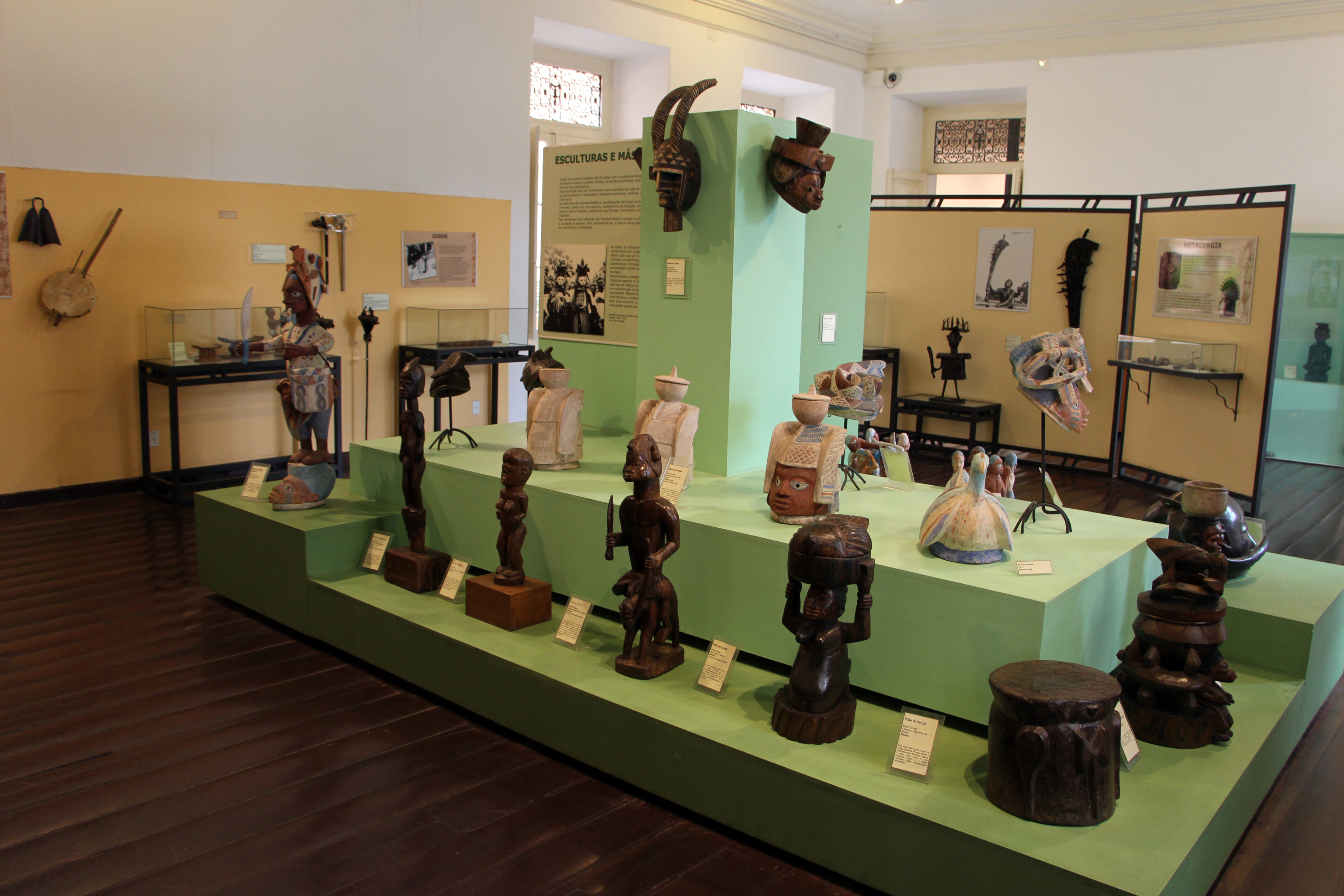 Museu Afro-Brasileiro, Salvador